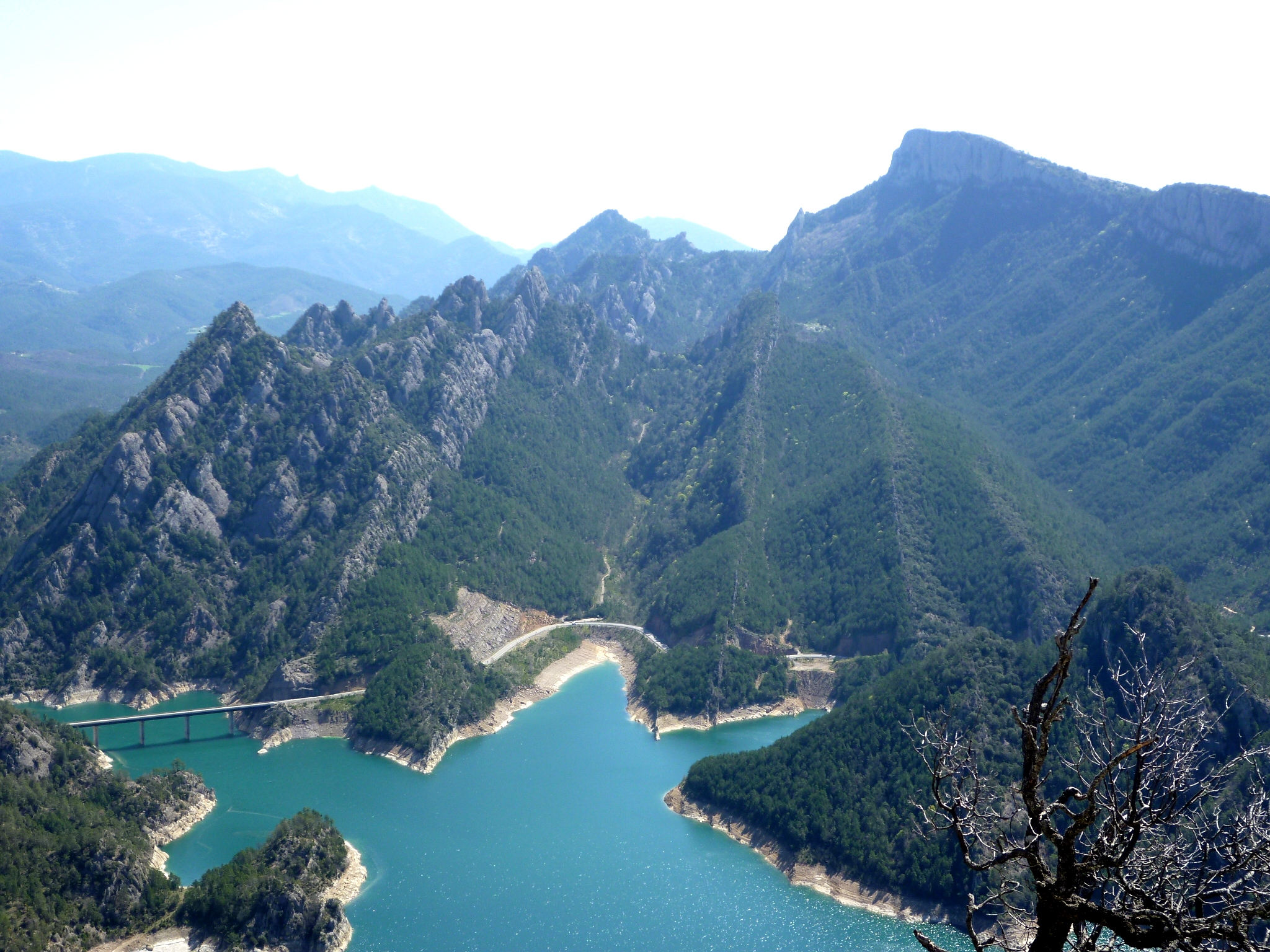 Sector occidental dels Llengots, a la Serra dels Bastets, vist des del Tossal de Vall-llonga, a Guixers (Solsonès - Catalunya)